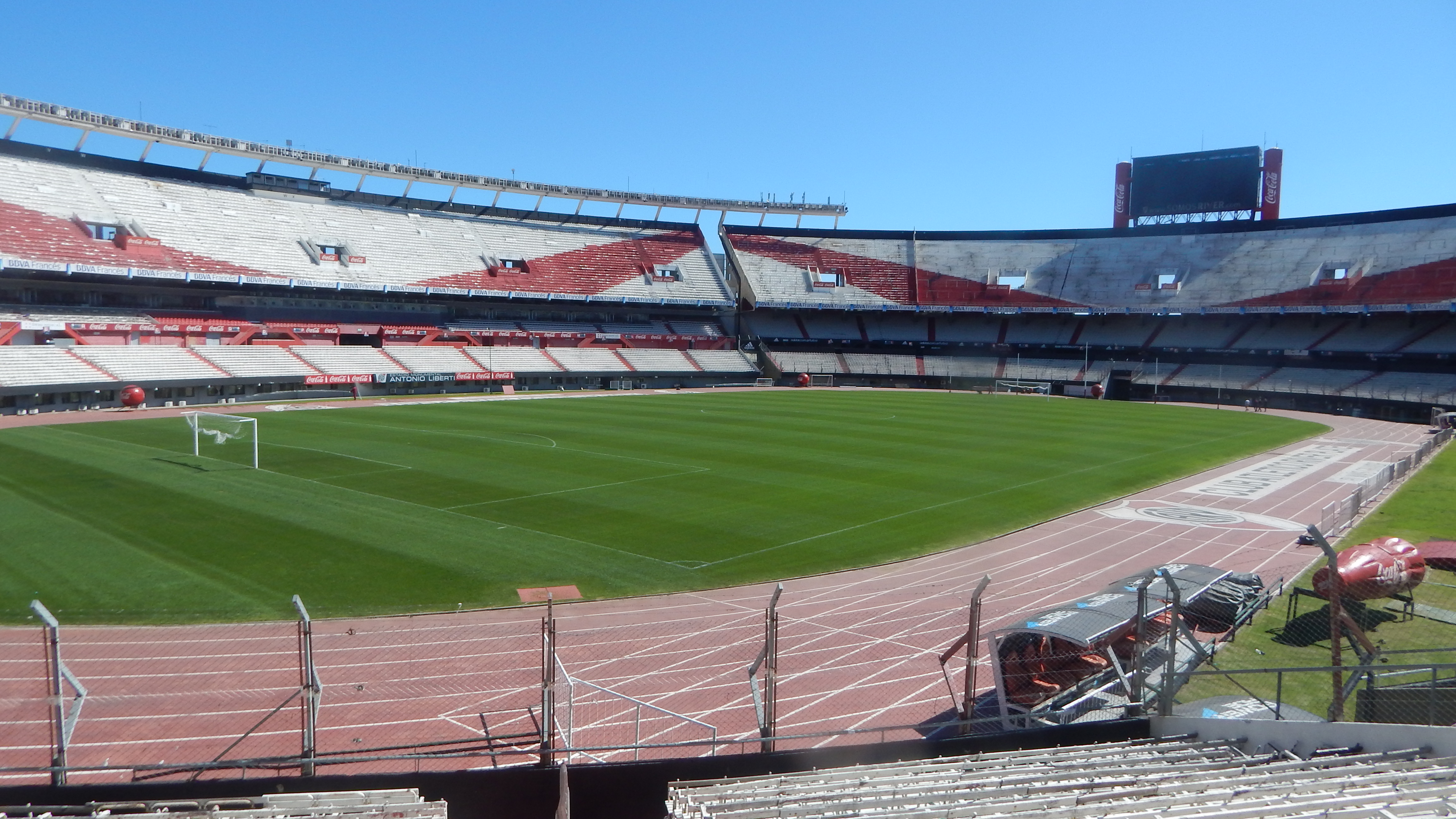 Estadio Antonio Vespucio Liberti "El Monumental" del Club Atlético River Plate, en septiembre de 2016.